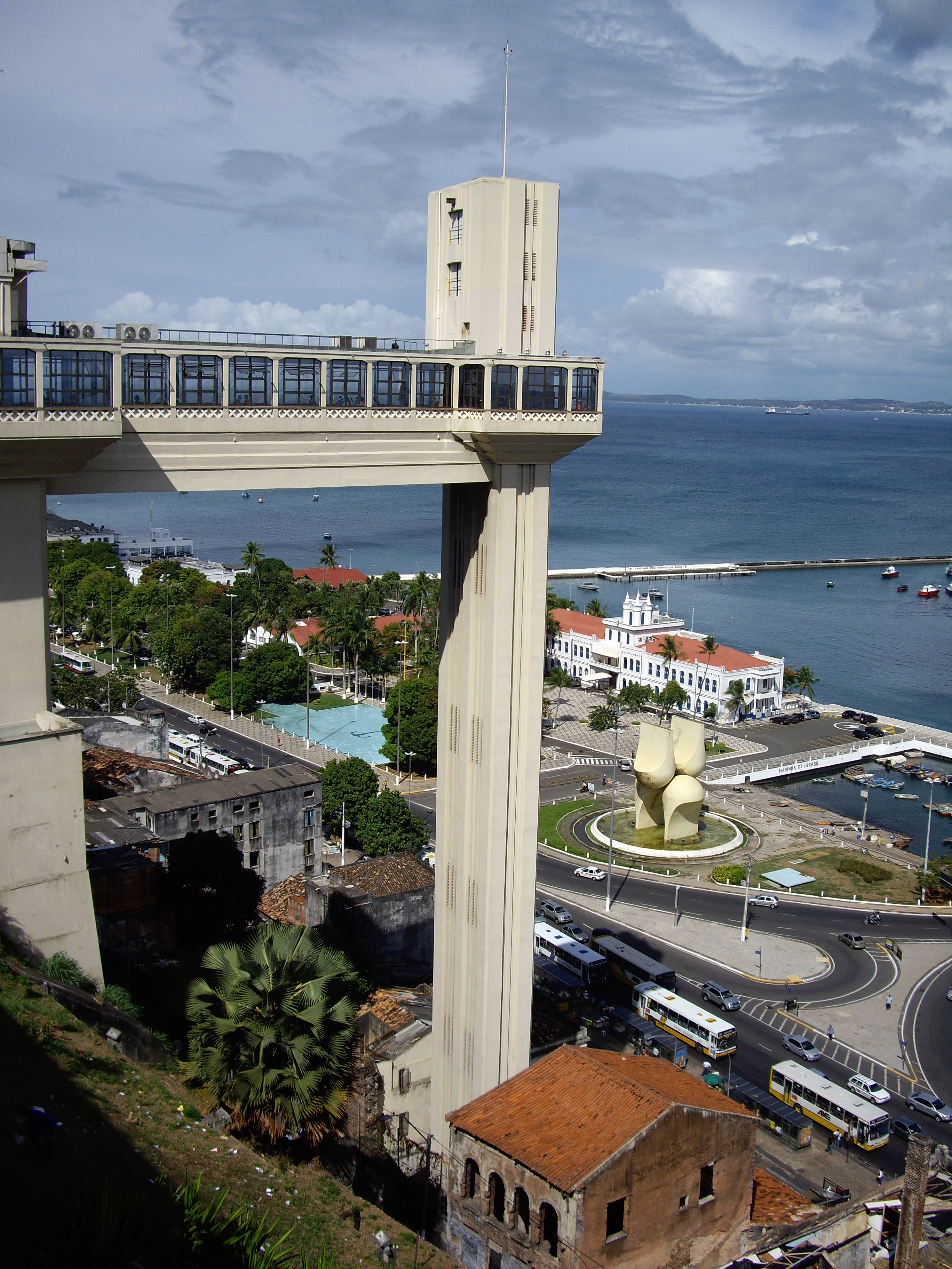 Kosten für eine Fahrt: 2 Ct.